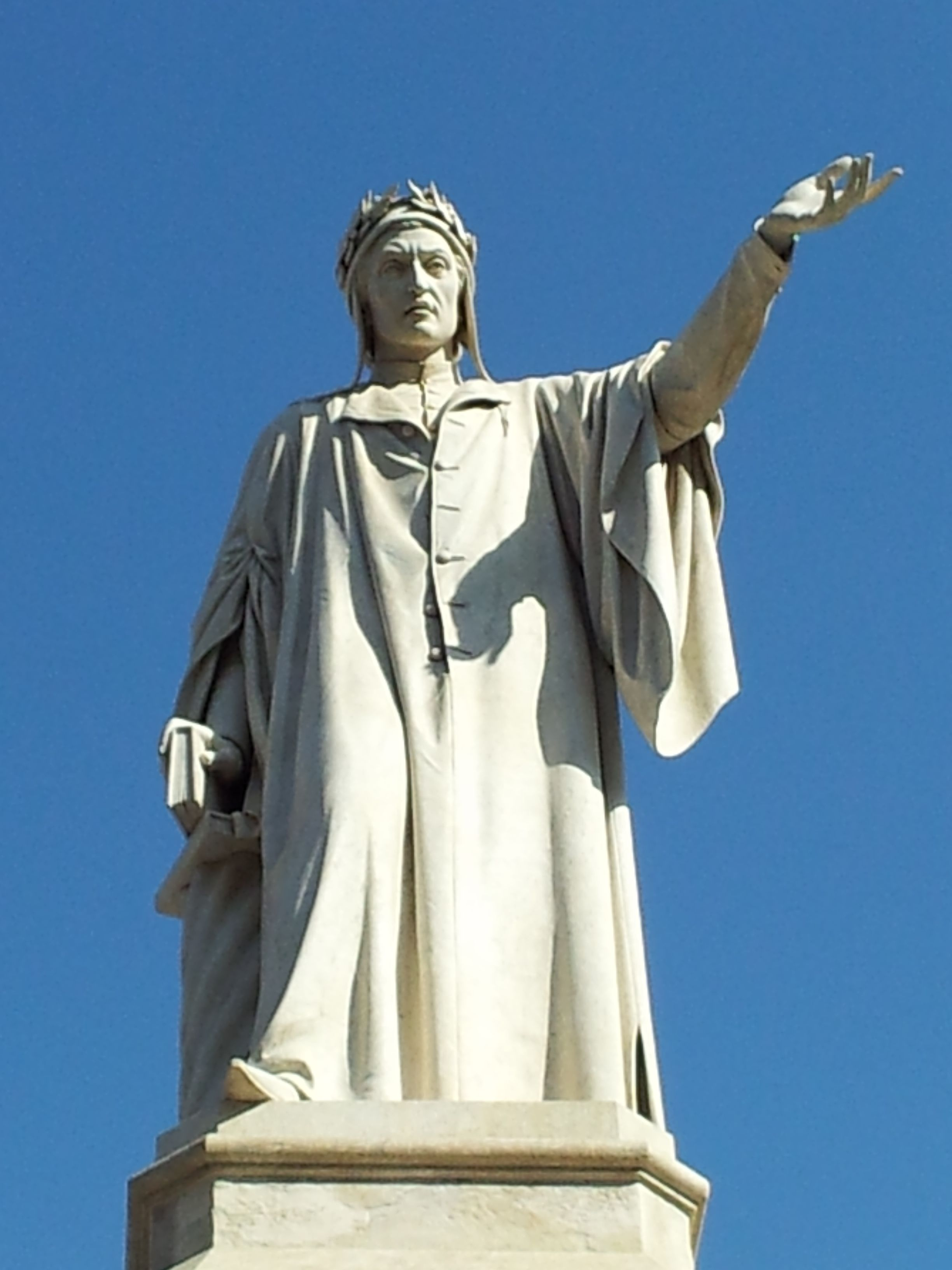 Particolare di Dante in Piazza Dante (Napoli)